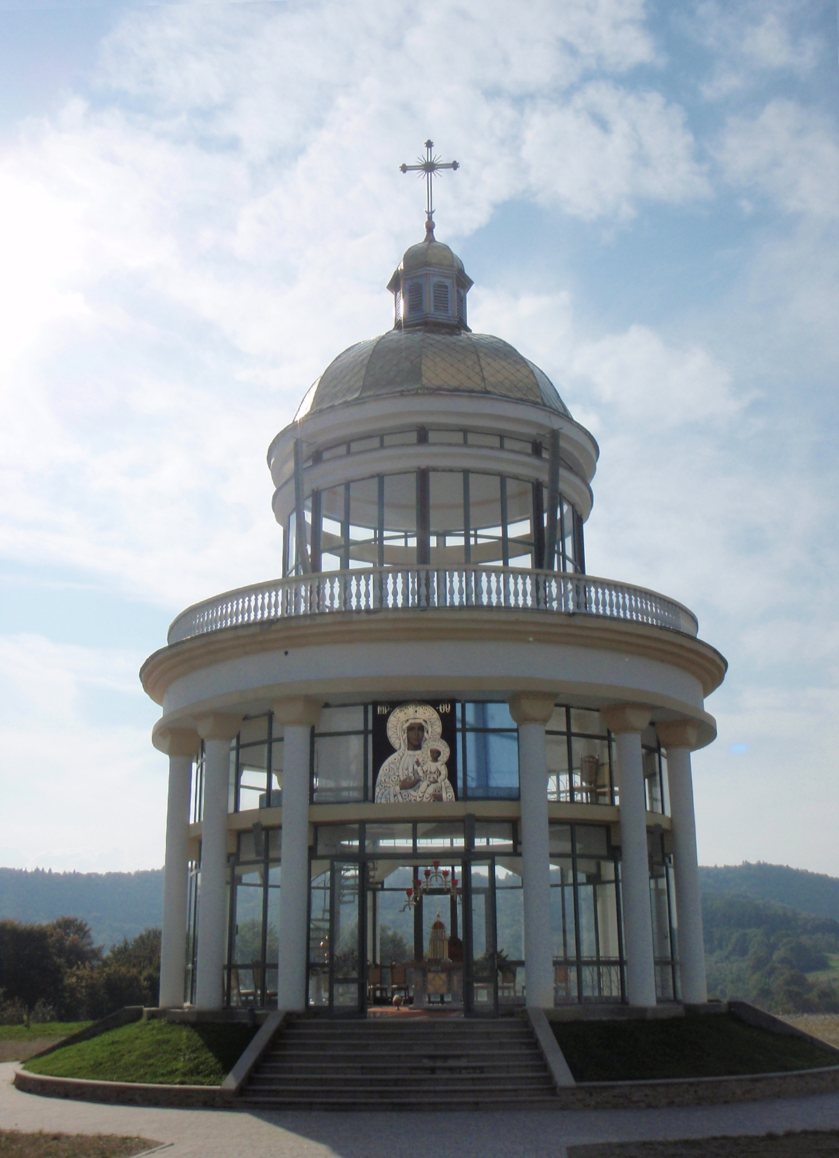 Гошівський монастир